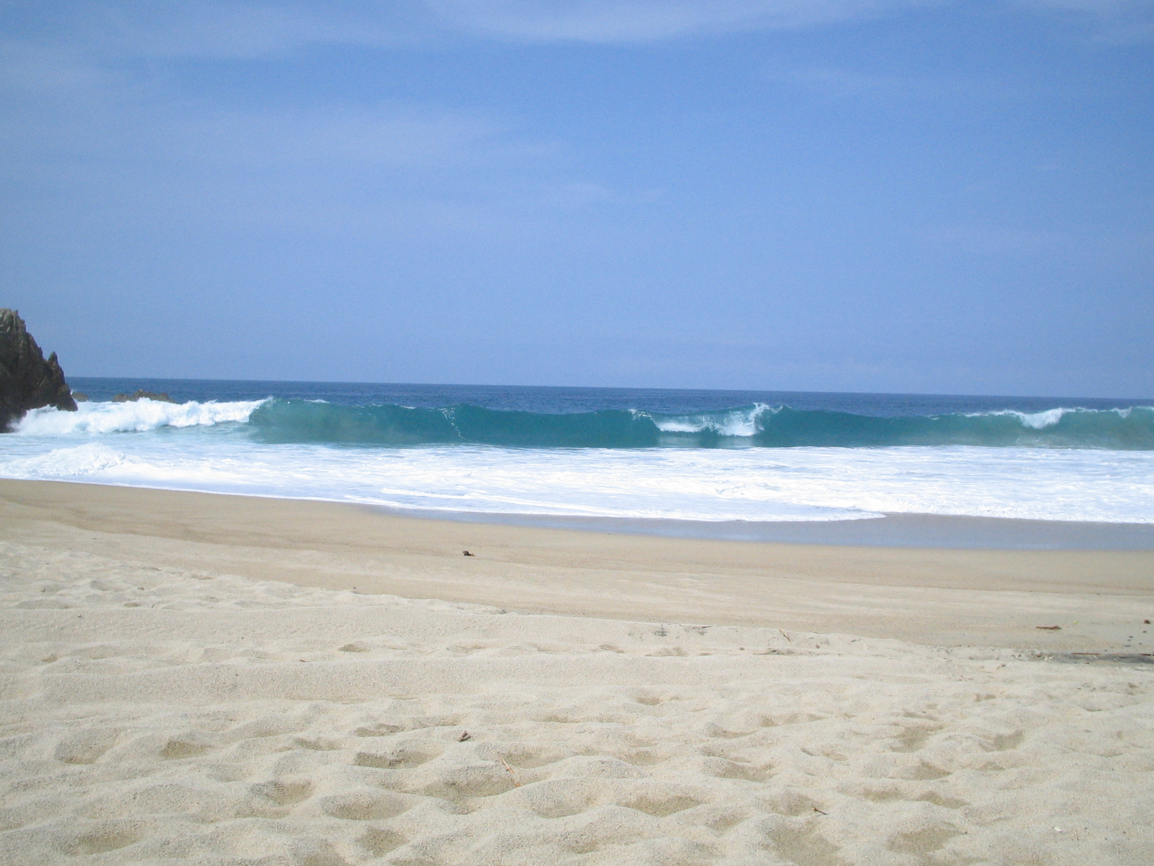 playa Maruata, Michoacan, Mexico